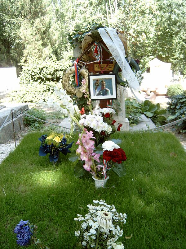 Kolonics György sírja Budapesten. Farkasréti temető: 8/1/A-1-67/68